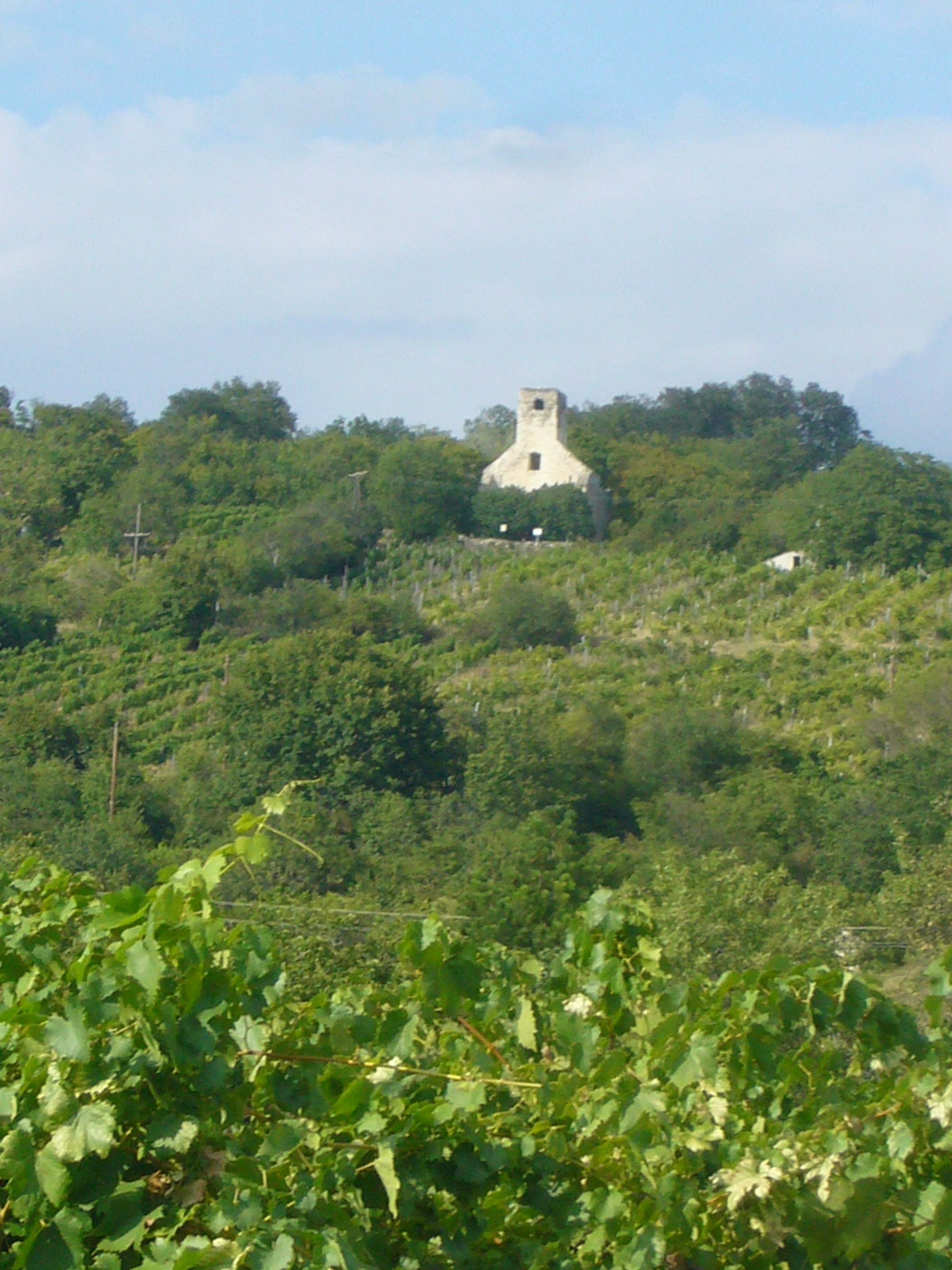 Szentantalfa